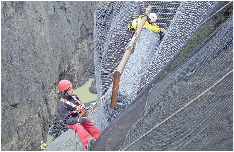 Montaż kurtyny na skarpie